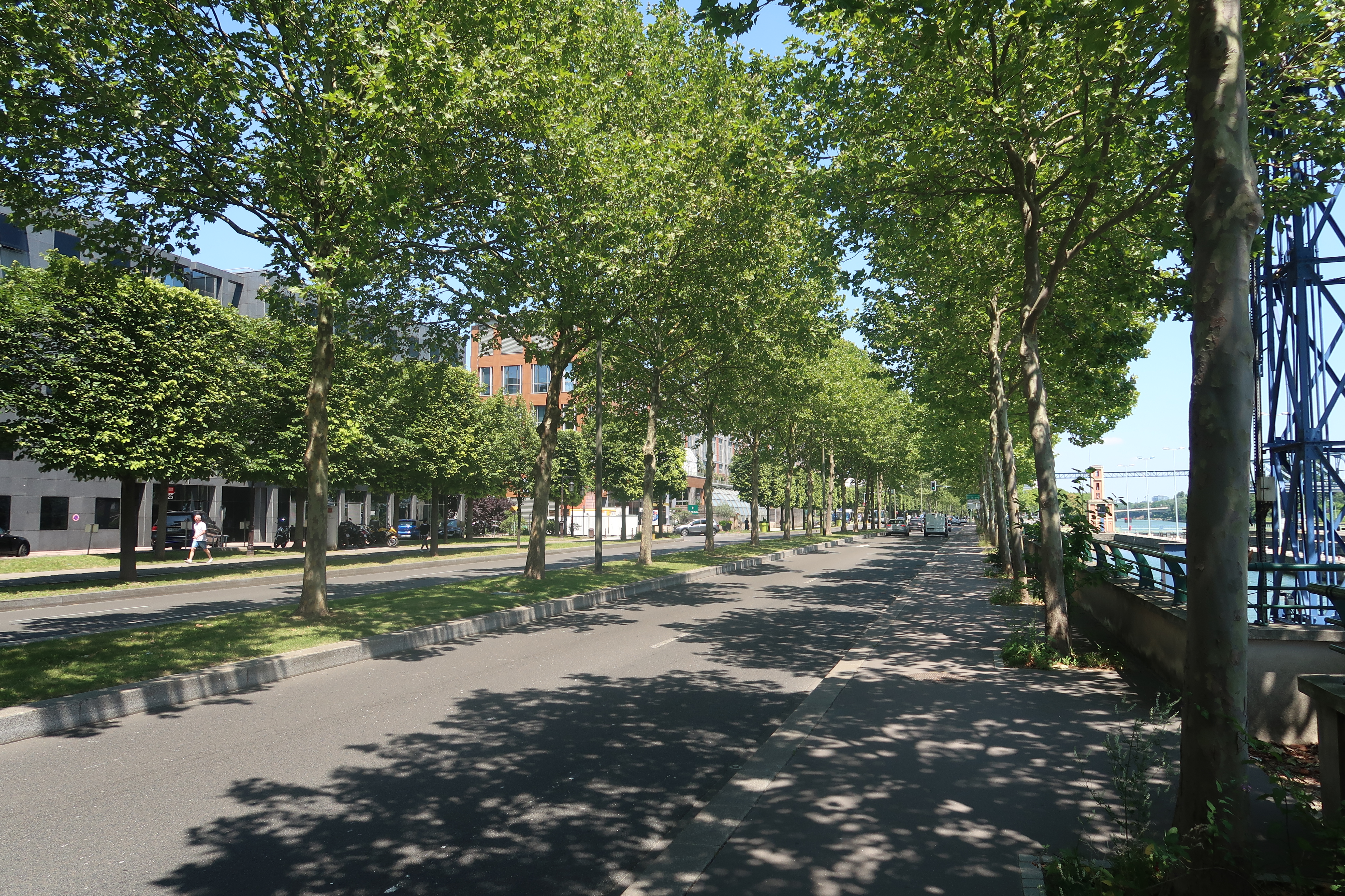 Quai Gallieni à Suresnes (Hauts-de-Seine).